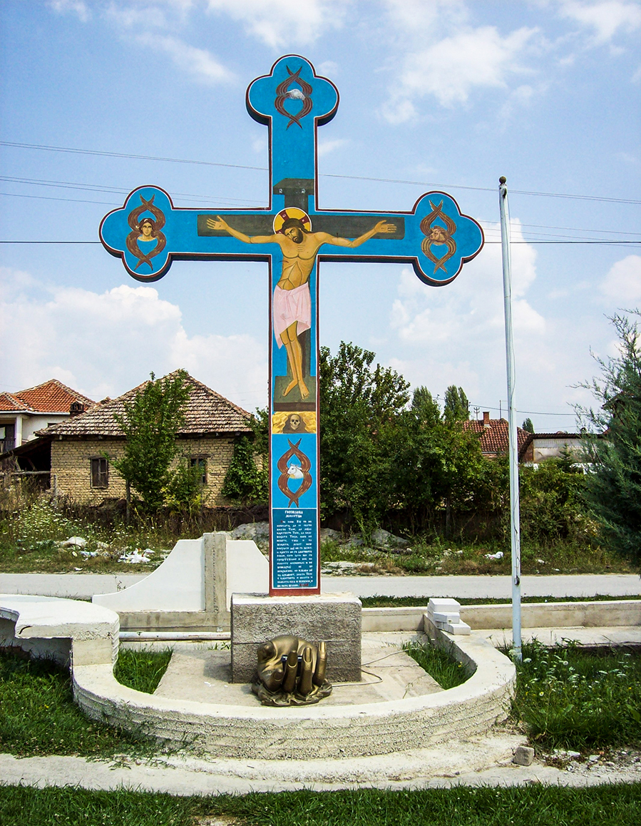 Црква „Св. Преполовение“ -Ложани, крстот пред црквата